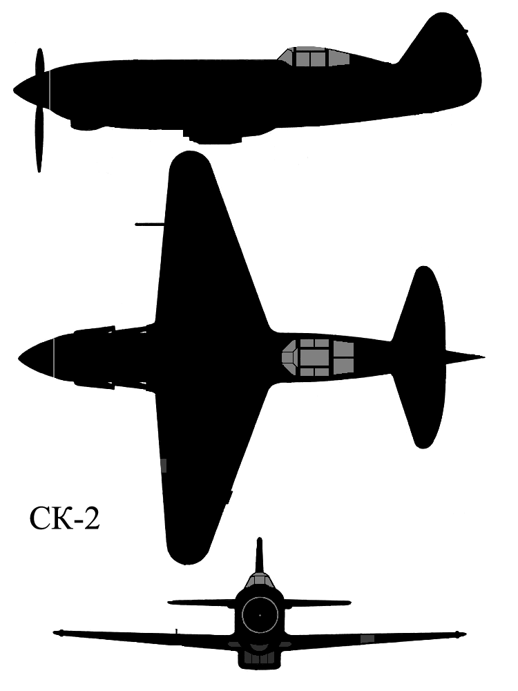 Силуэты трех проекций истребителя Бисновата СК-2